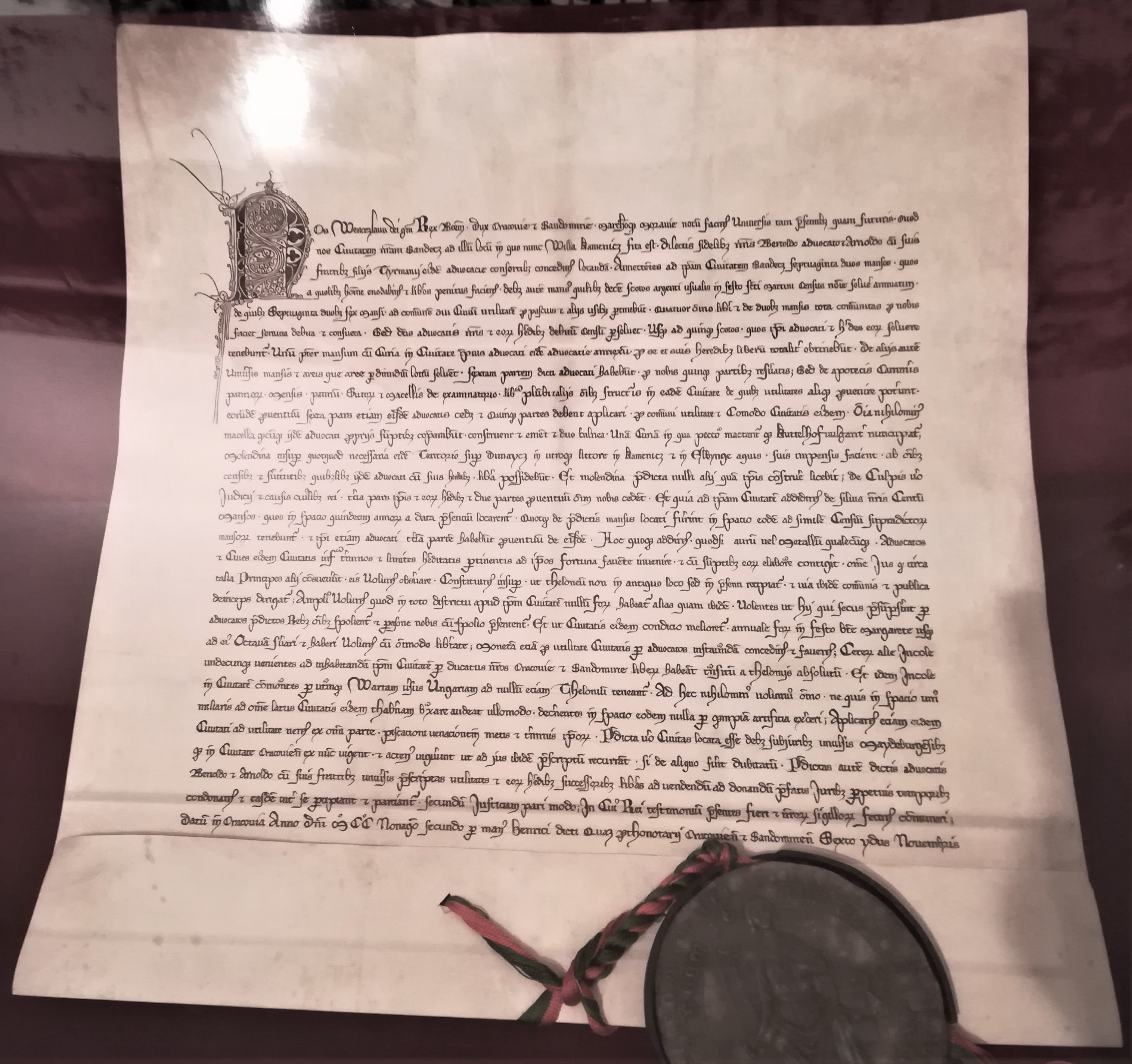 Rekonstrukcja dokumentu lokacyjnego Nowego Sącza z 8 listopada 1292 (Waclaw II).